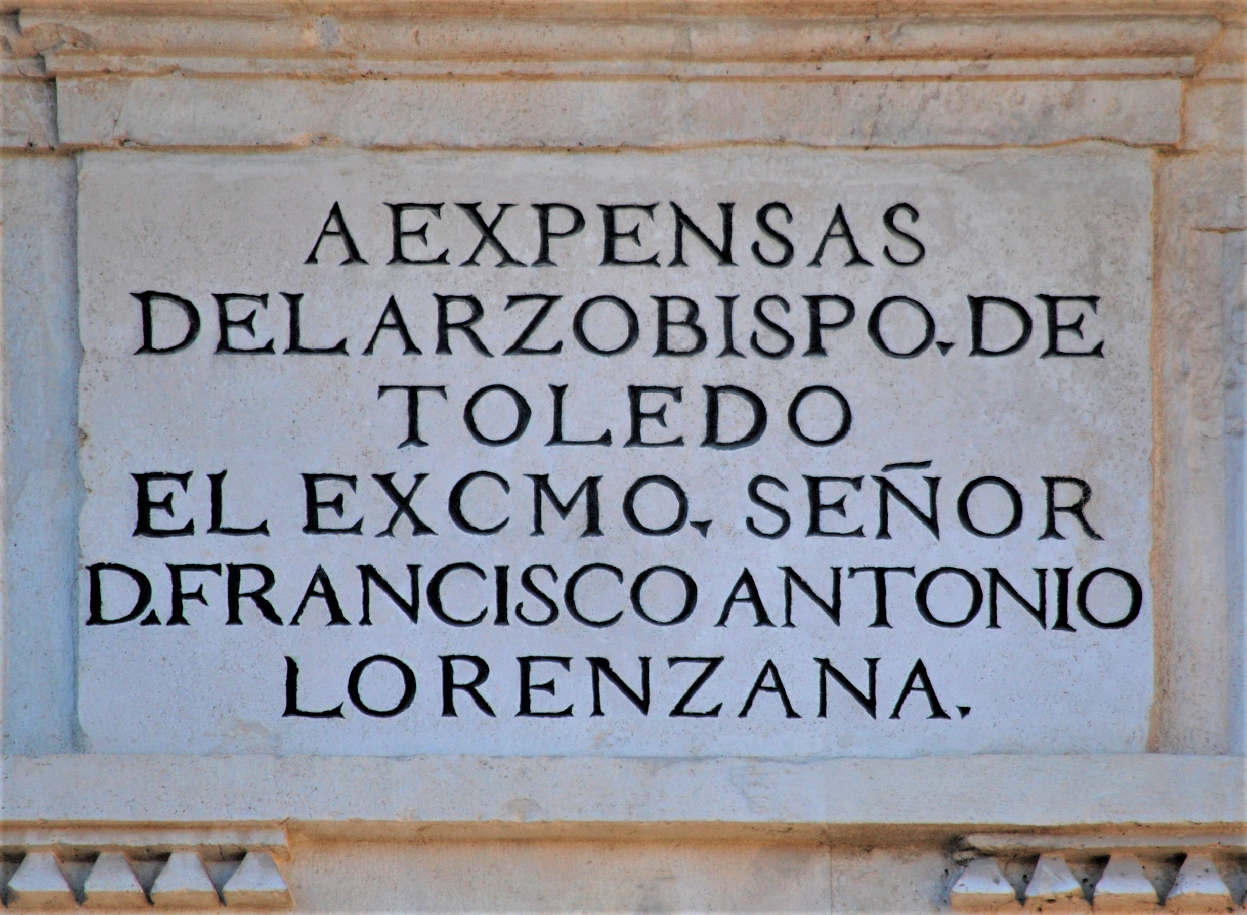 Lápida situada en el frontón de la fachada este de la Puerta de Madrid en Alcalá de Henares (Comunidad de Madrid - España). Presenta grabada la inscripción: «A EXPENSAS DEL ARZOBISPO DE TOLEDO EL EXCMO. SEÑOR D. FRANCISCO ANTONIO LORENZANA.».